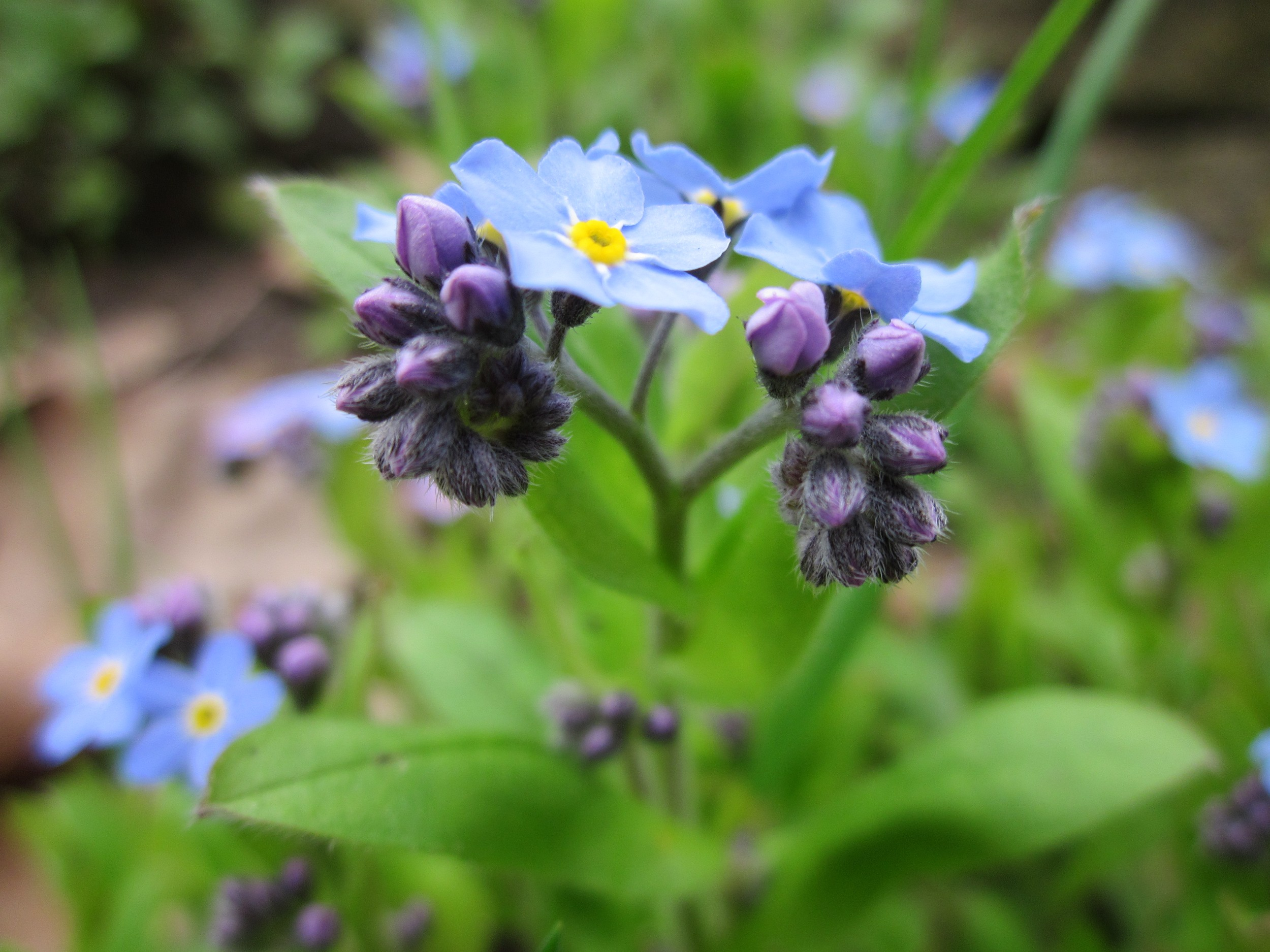 Wald-Vergissmeinnicht (Myosotis sylvatica) im Bürgerpark Saarbrücken